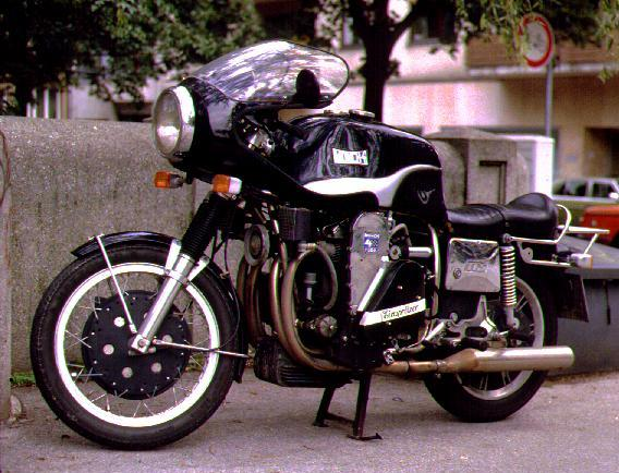 Münch 1200 TTS-E, deutsches Motorrad-Modell selbst fotografiert Anfang der 1990er Jahre am Deutschen Museum, München Kassander der Minoer 21:23, 5. Dez 2005 (CET)